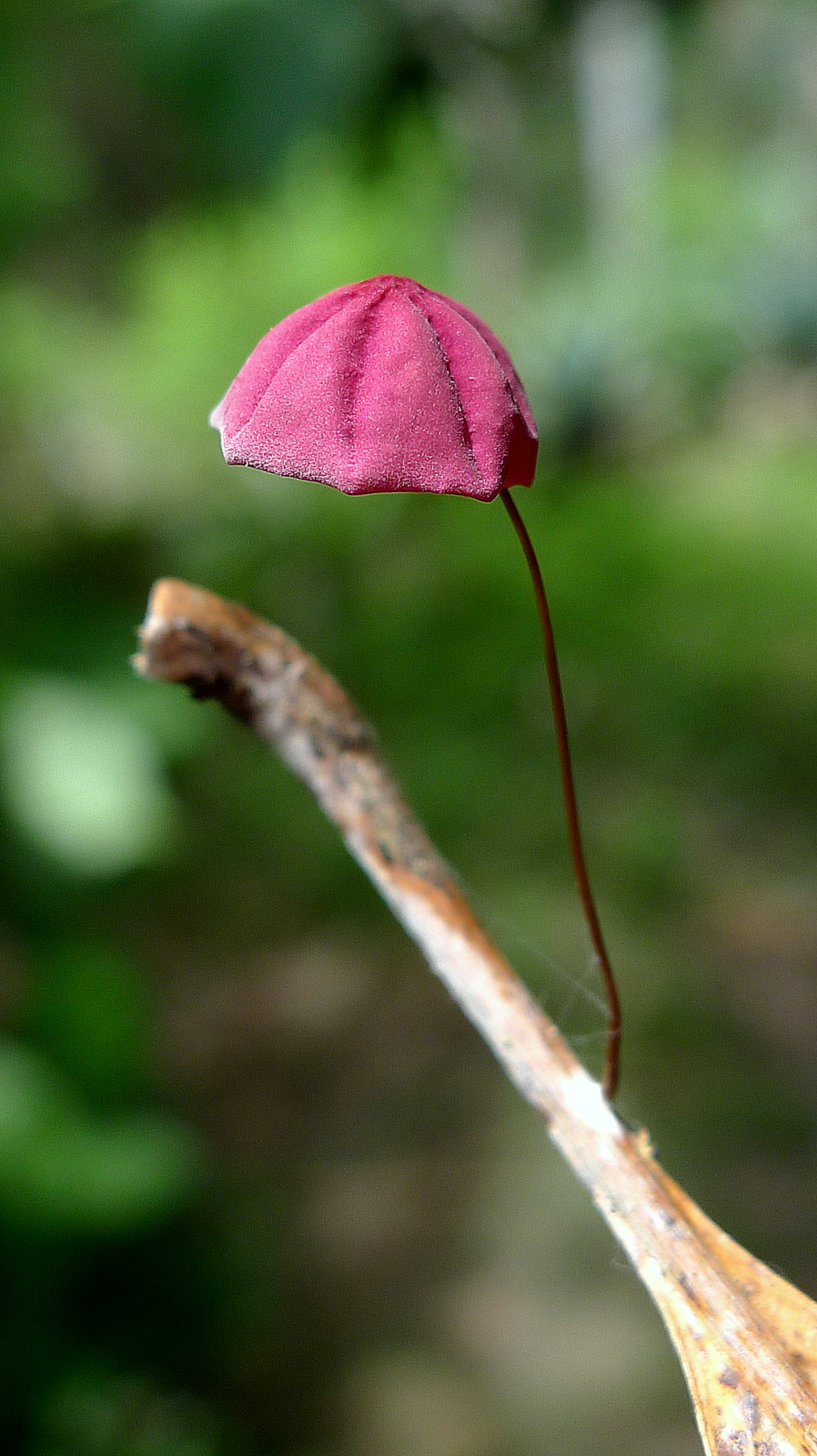 Marasmius haematocephalus (Mont.) Fr.